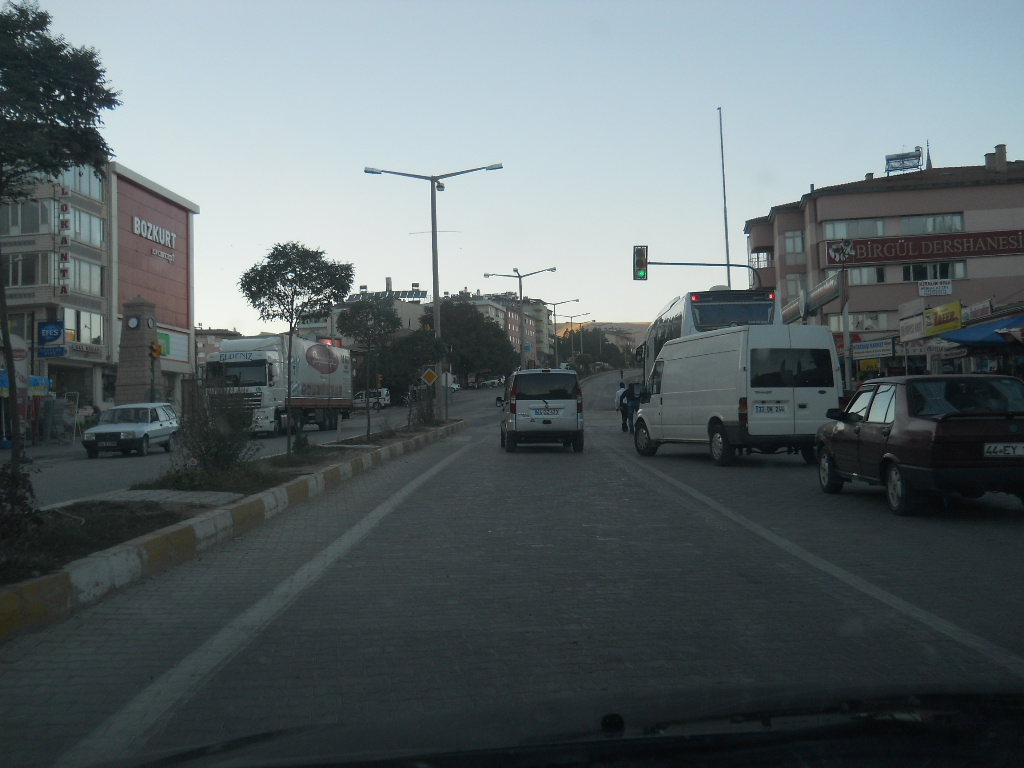 Malatya ili Darende ilçesinden görünüm